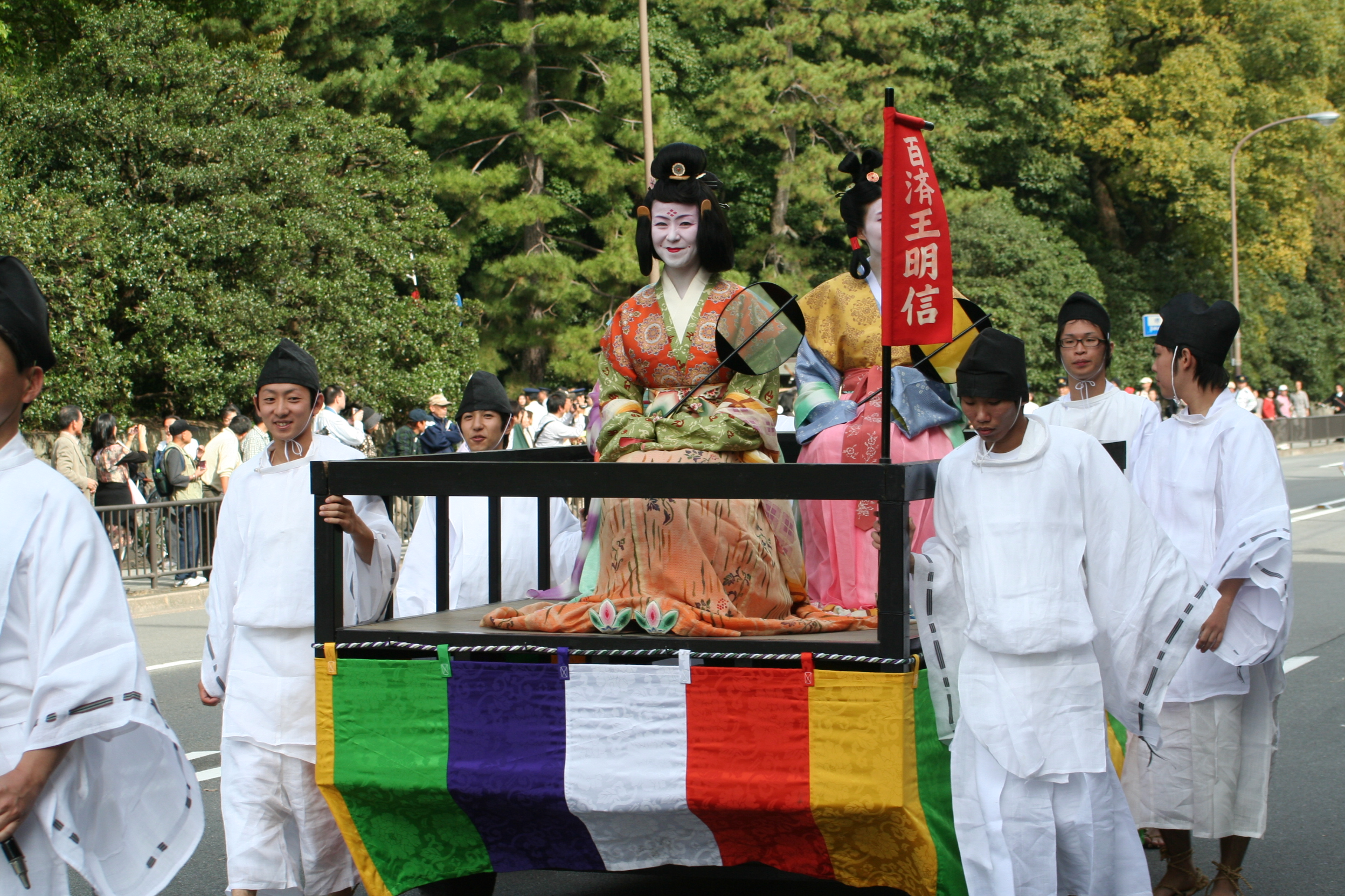 京都府京都市にて開催された時代祭。正午の御所から平安神宮までの行進の様子。2009年10月22日撮影。 百済王明信。